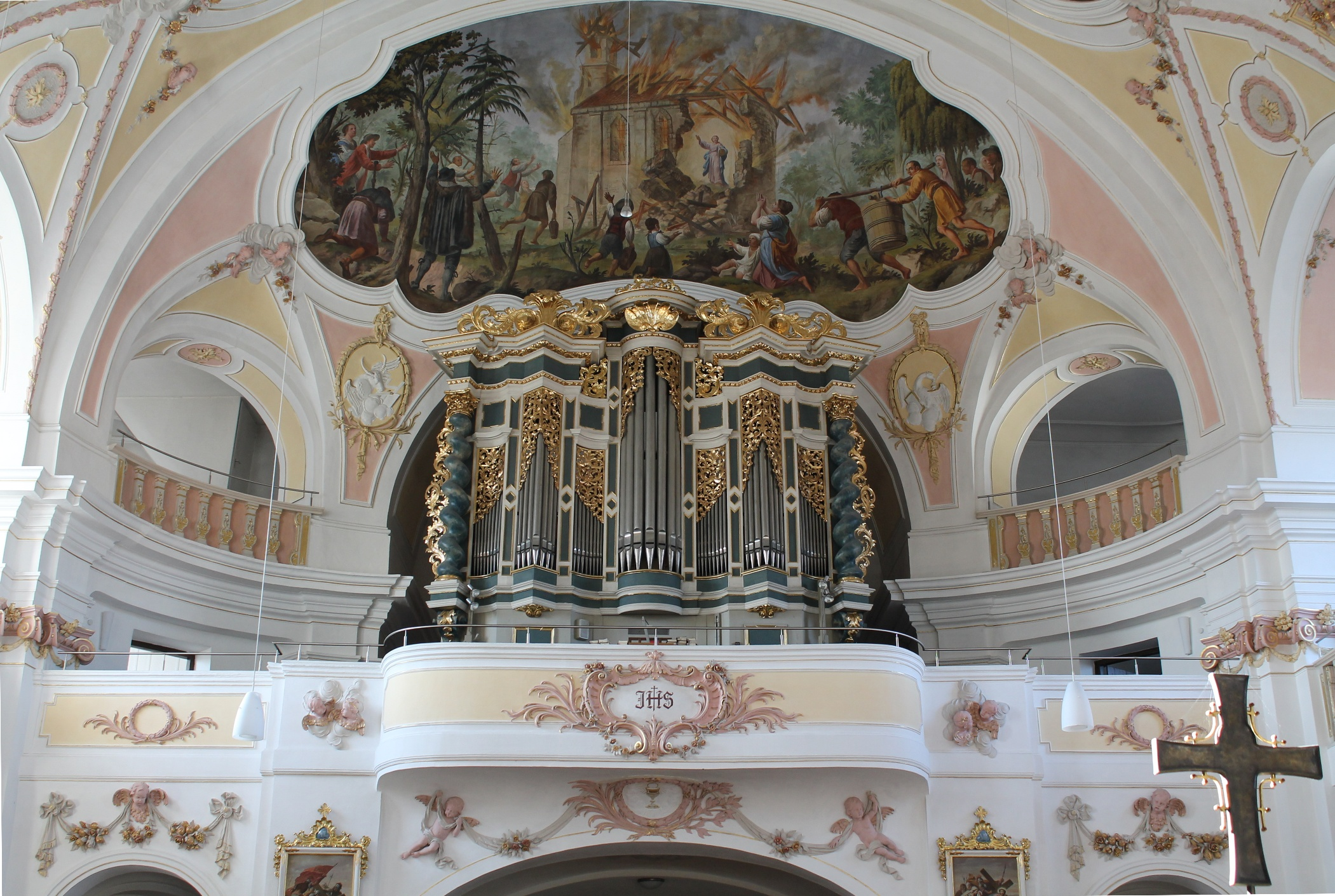 Orgel von St. Salvator in Bettbrunn (1894, Franz Borgias Maerz op. 307,II/20)